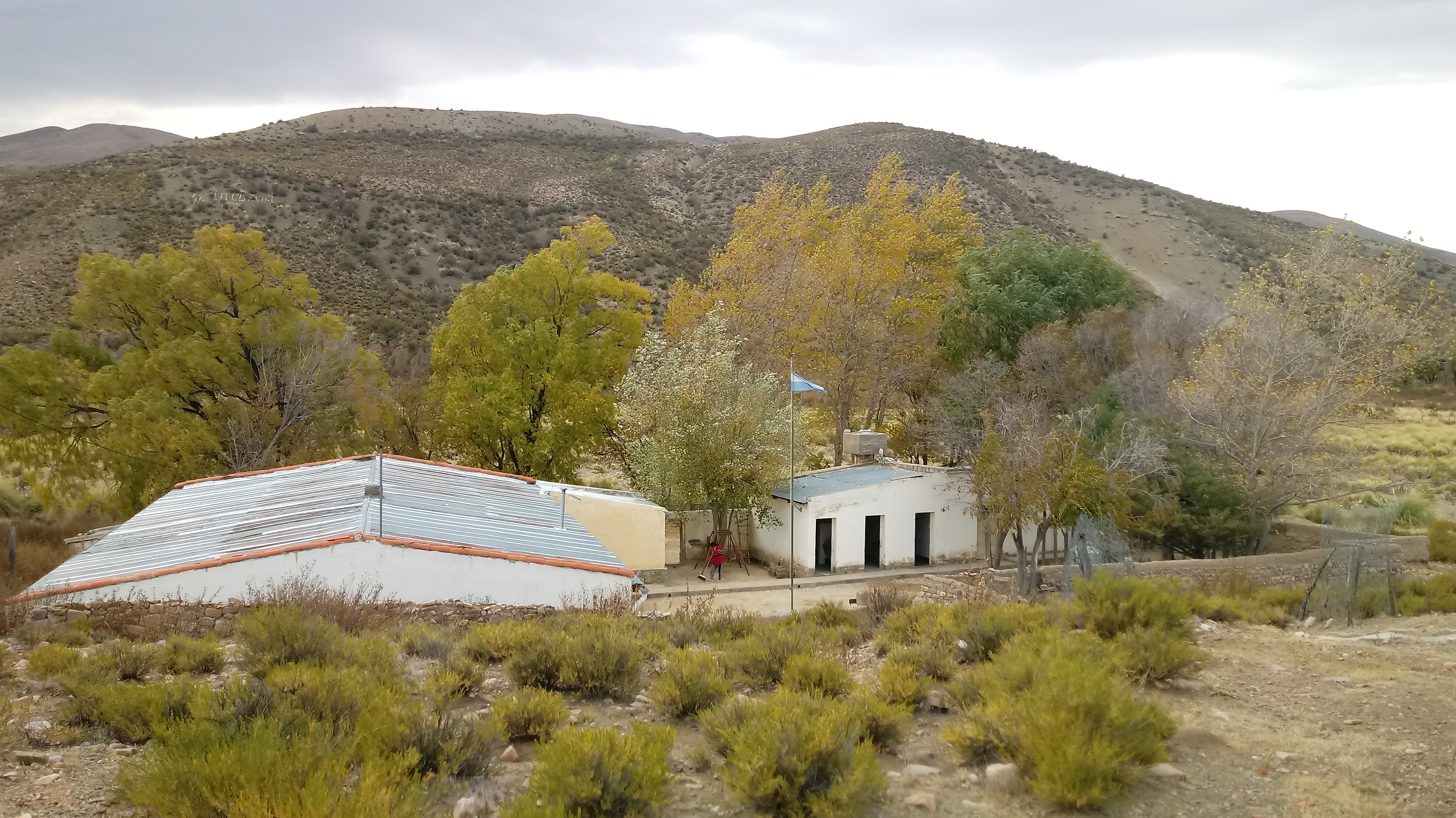 Escuela Rural Quebrada de Humahuaca